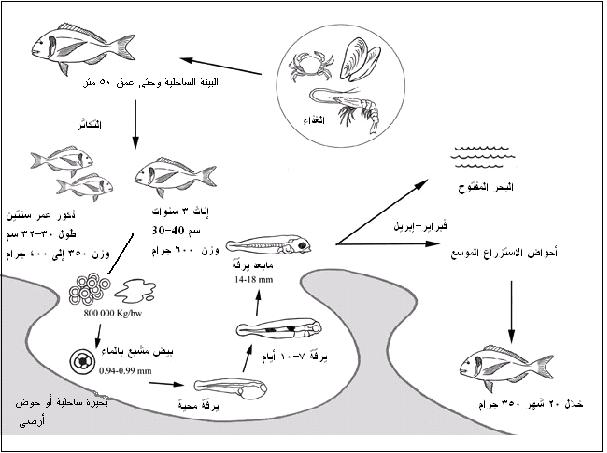 دورة انتاج أسماك الدنيس